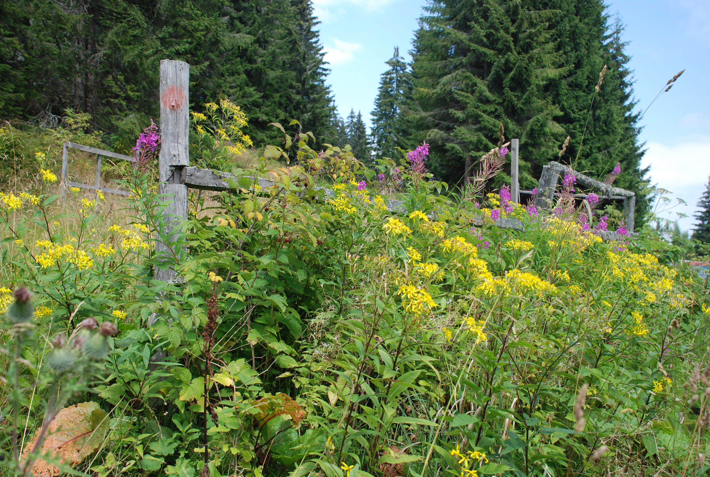 Blüten am Wegrain, Hebalm